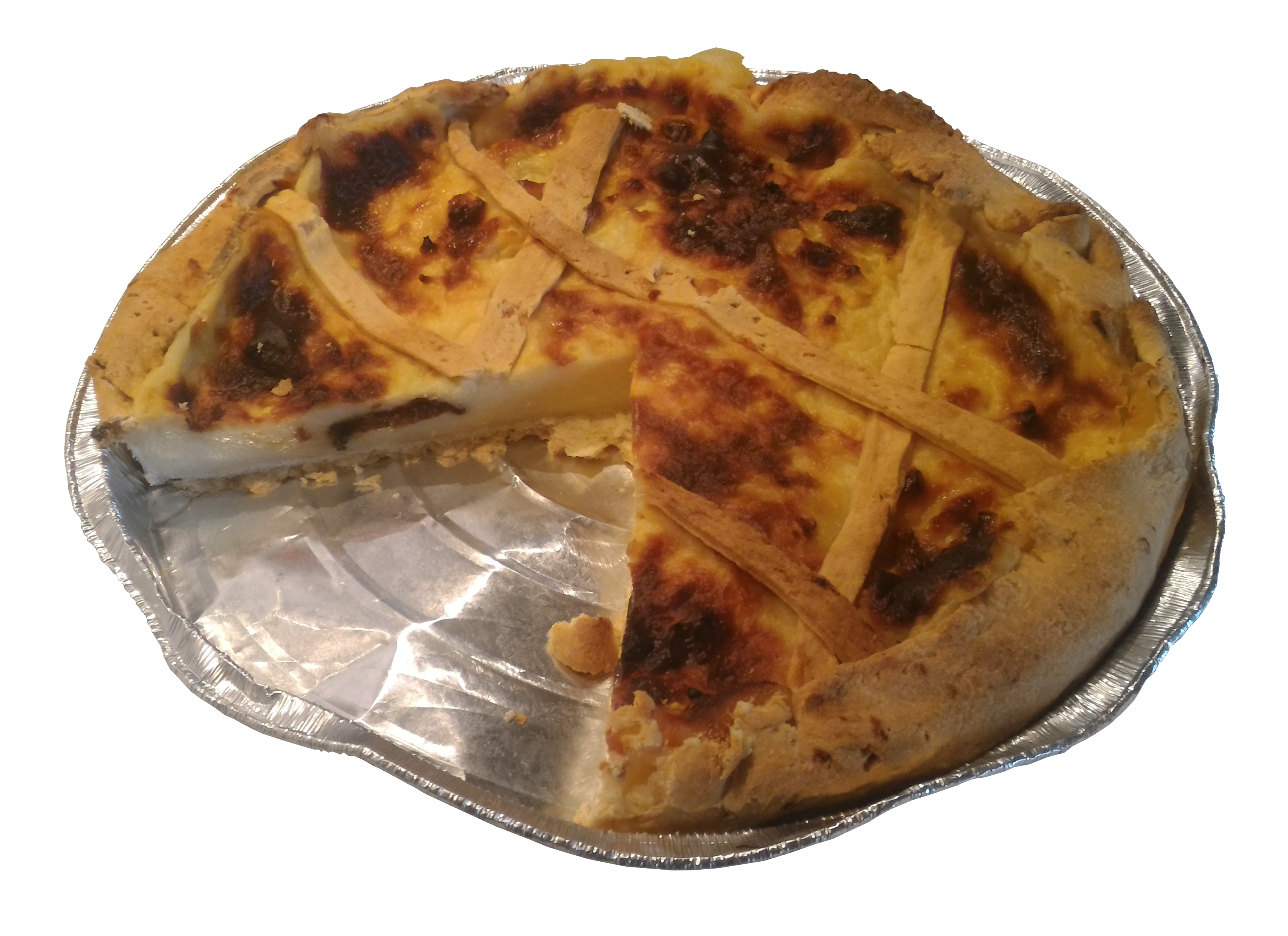 Tarte au papin, spécialité boulonnaise (nord de la France)